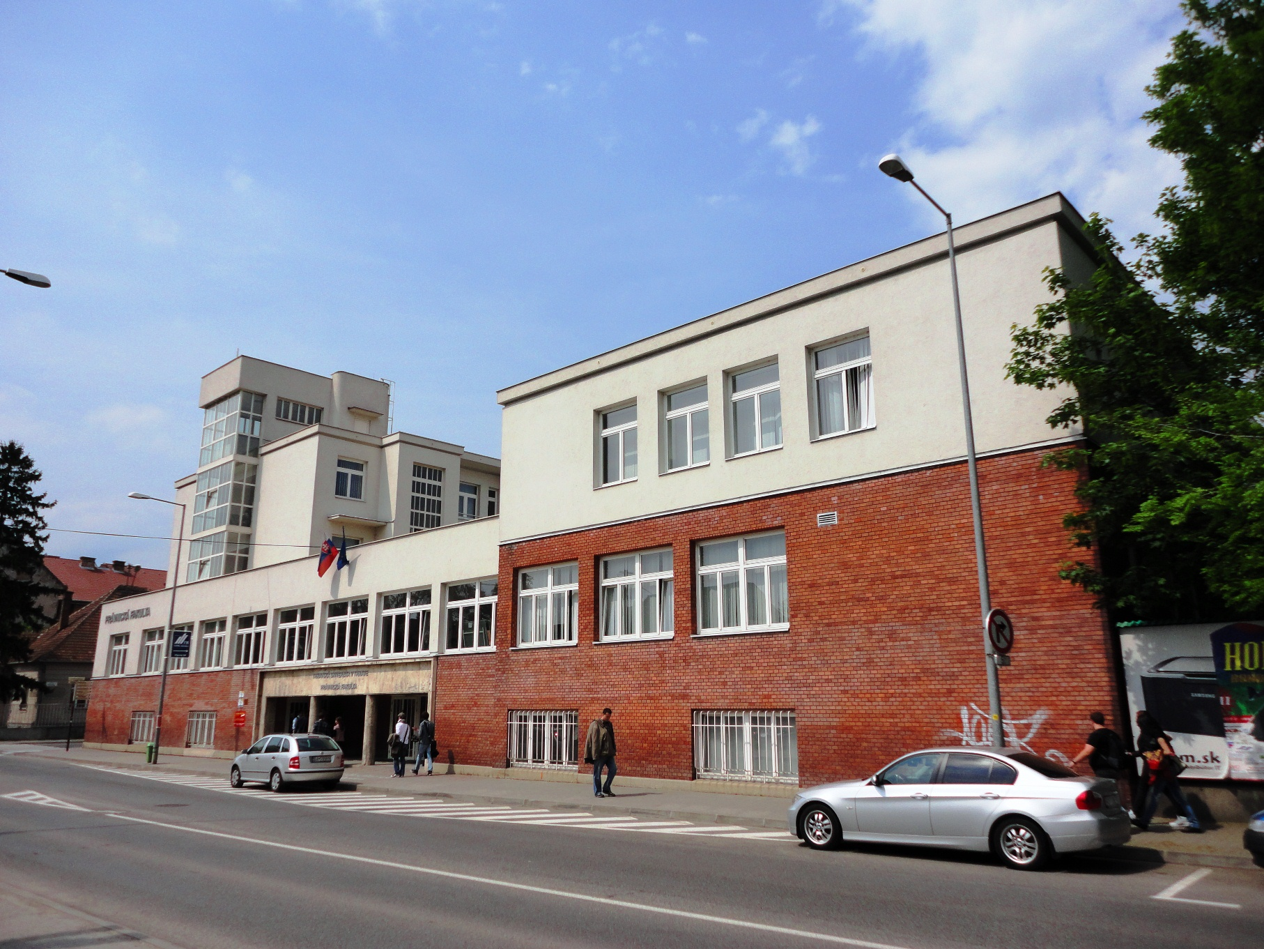 budova Právnickej fakulty Trnavskej univerzity v Trnave